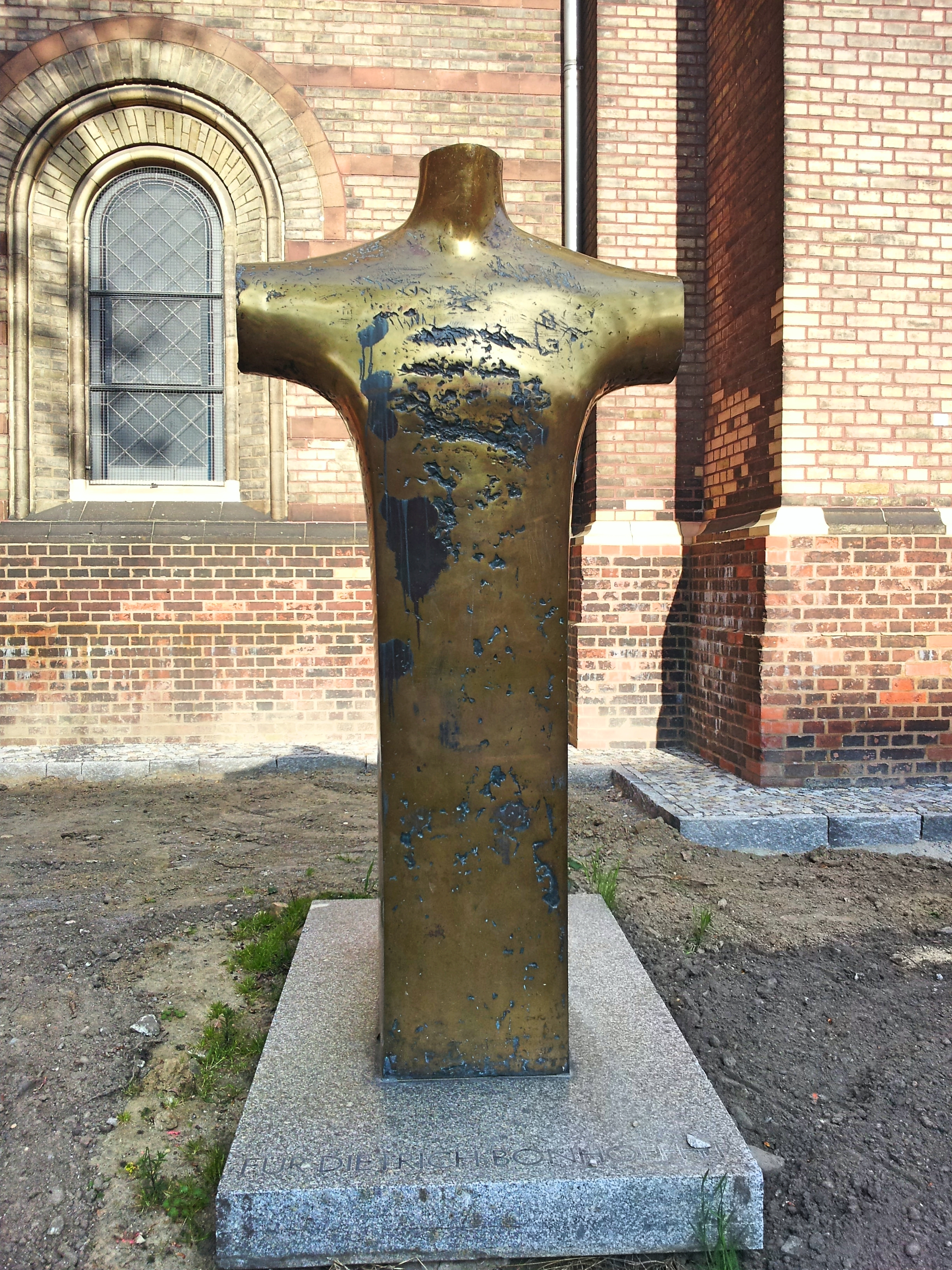 Der Torso an der Westseite der Zionskirche zur Erinnerung an Dietrich Bonhoeffer.